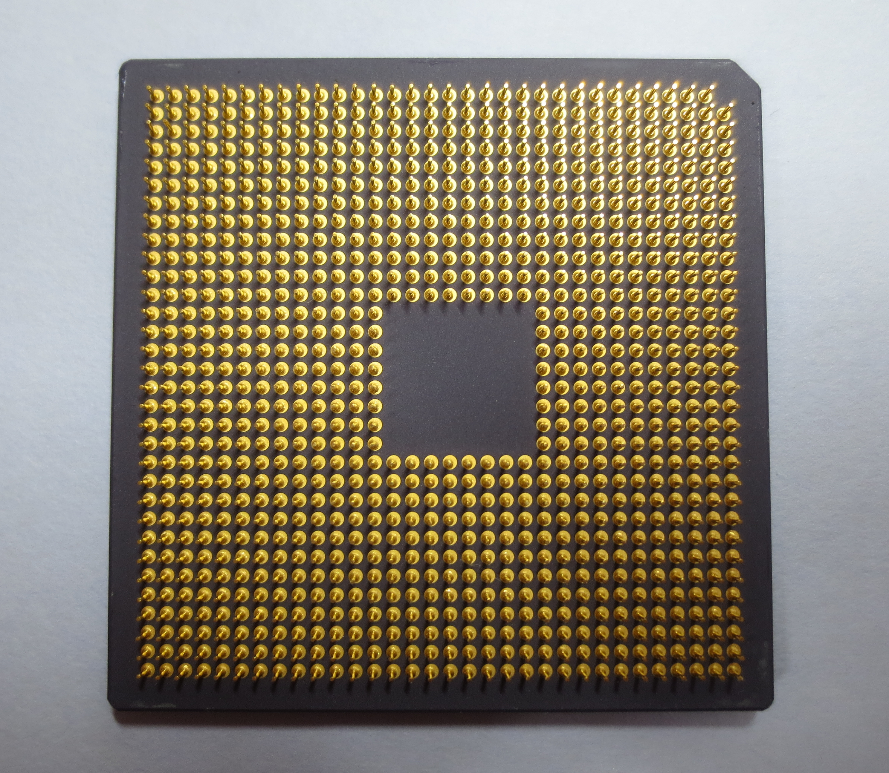 ピン数は959ピン。左右非対称なのが特徴的。